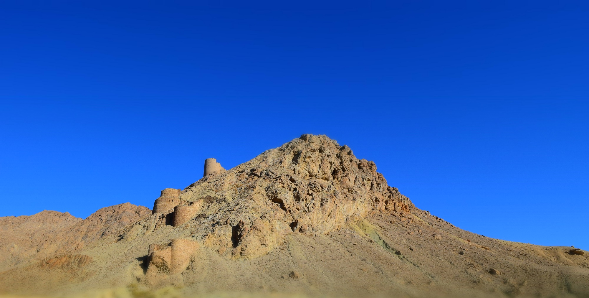 واقع در روستای منصورکوه. تصویر: امیرحسین فراتی